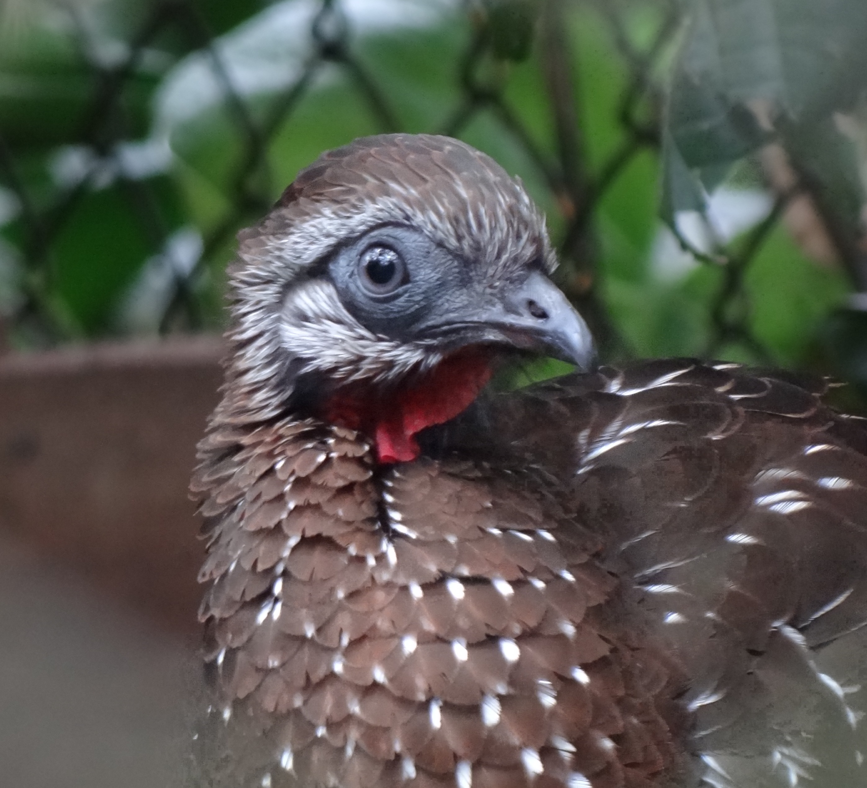 Pava de monte andina (Penelope montagnii) en el Zoológico de Santacruz, Cundinamarca, Colombia.